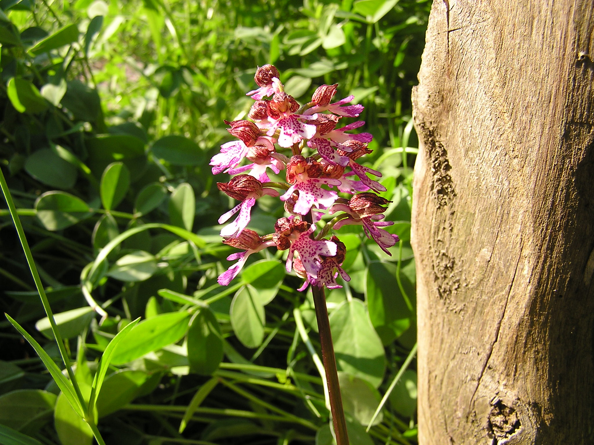 La foto è stata scattata alla fine di aprile al Parco del Cardeto di Ancona. Rappresenta un'orchidea purpurea (Orchis purpurea), specie che difficilmente si può osservare in parchi urbani.